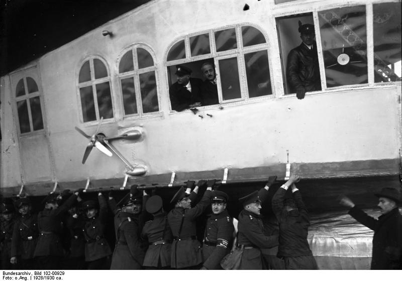 Stadtbaurat Adler (Mitte)